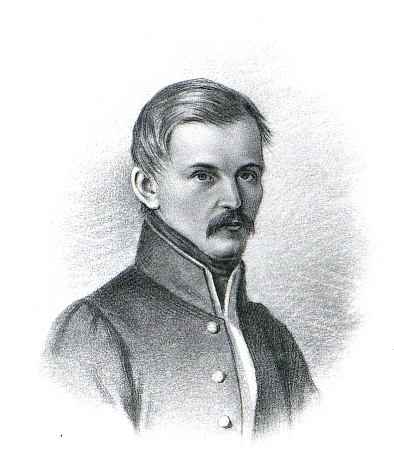 Басаргин, Николай Васильевич